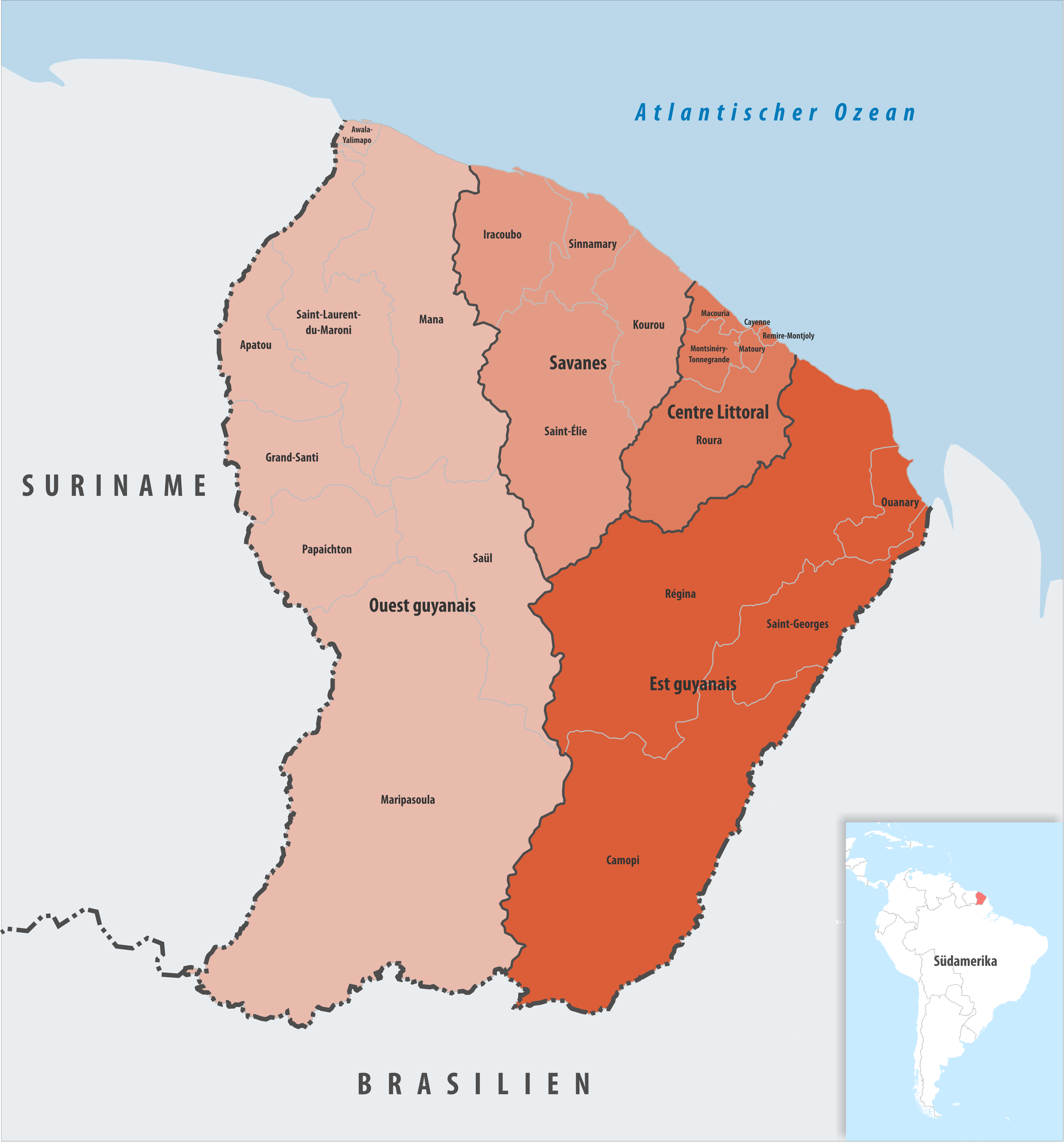 Gemeindeverbände in Französisch-Guyana